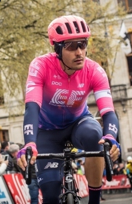 Italiaanse wielrenner Alberto Bettiol van ploeg EF Education First Pro Cycling voor de start van Dwars door Vlaanderen in Roeselare, 3 april 2019 - Foto : Woud Demasure voor KOERS. Museum van de Wielersport